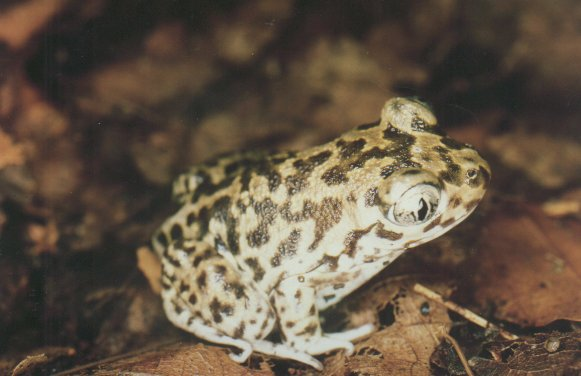 Pelobates cultripes